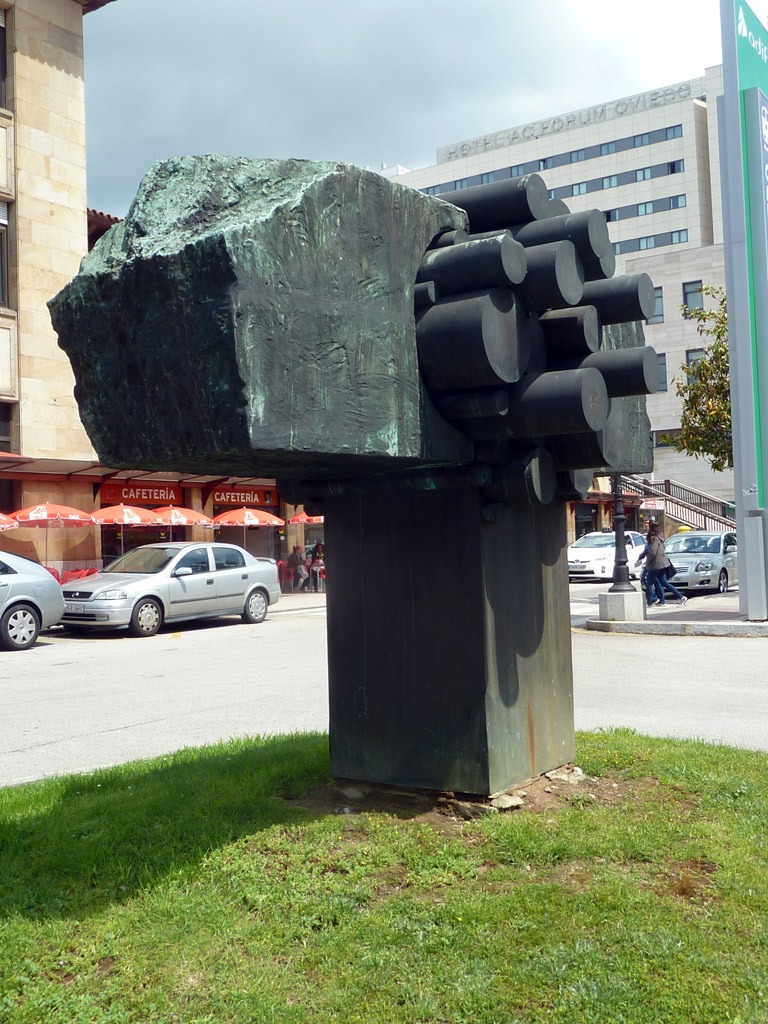 Pepe Noja.